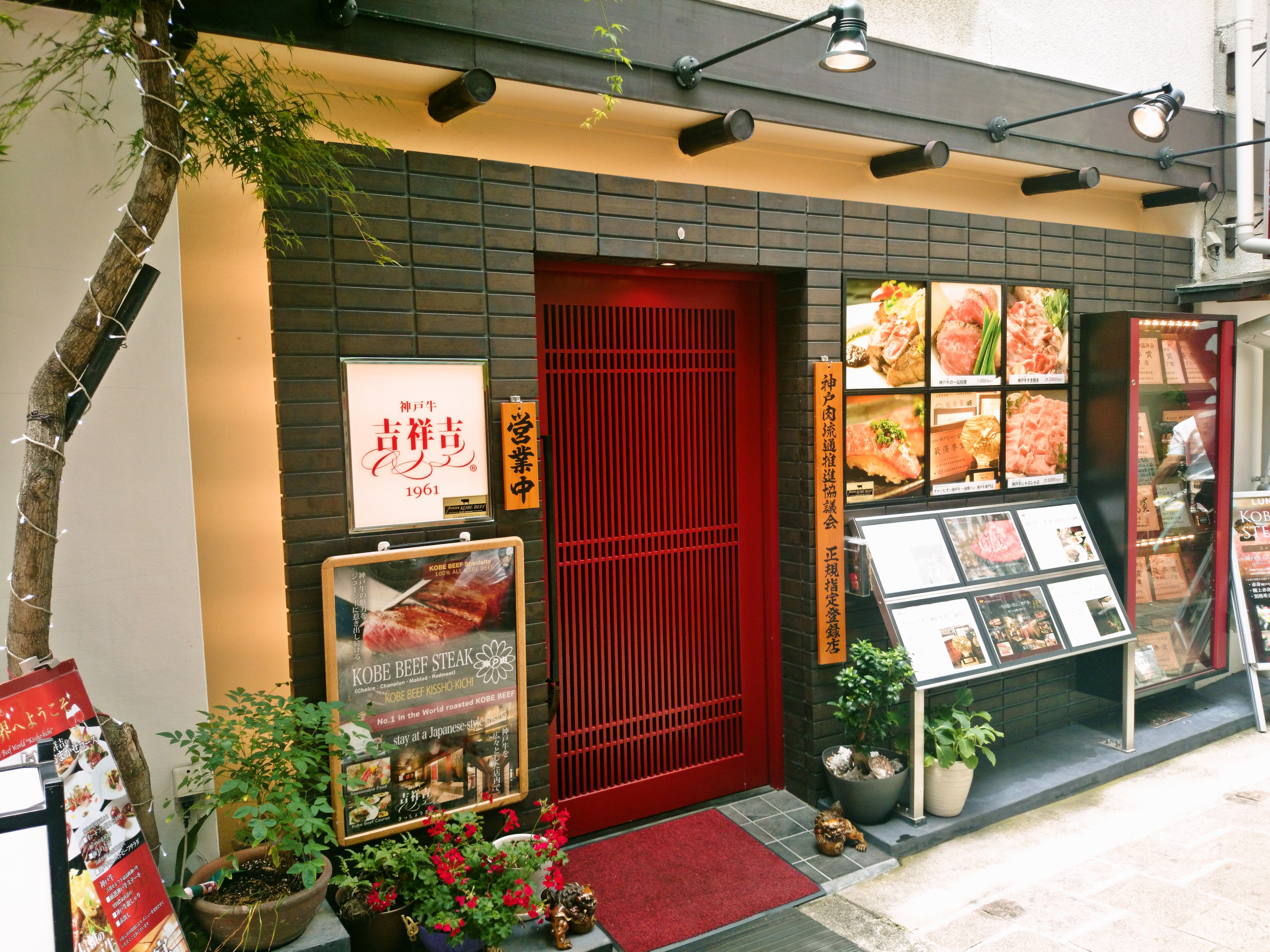 Head office of Kissho 吉祥吉 本店玄関